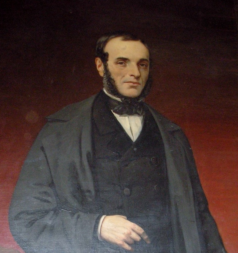 Detalle del retrato del empresario y político del siglo XIX Matías Cousiño, iniciador de la industria del carbón en Chile. Fue padre del también empresario, filántropo y político Luis Cousiño.